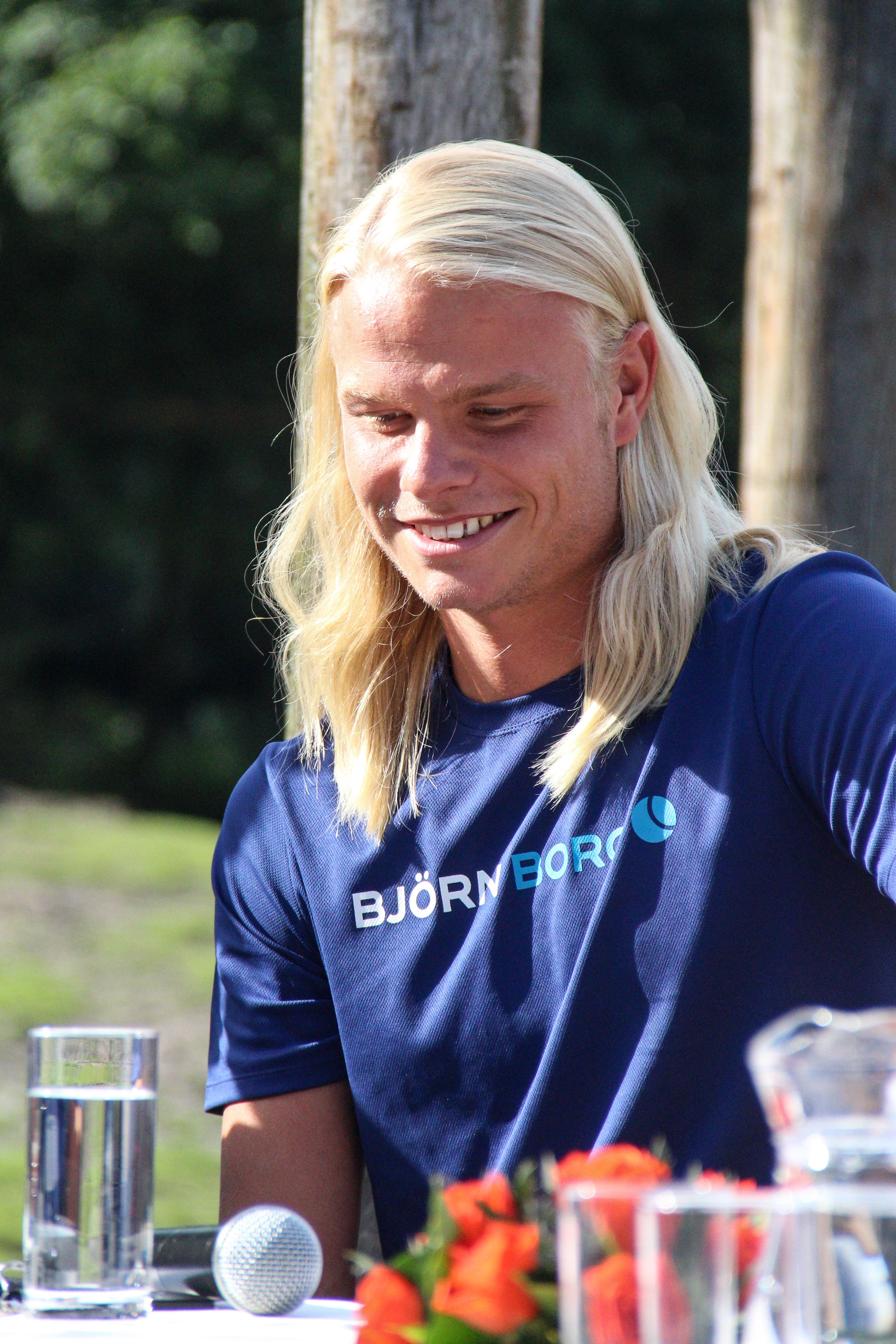 Koen Verweij tijdens Gouden Pijl in Emmen in 2014